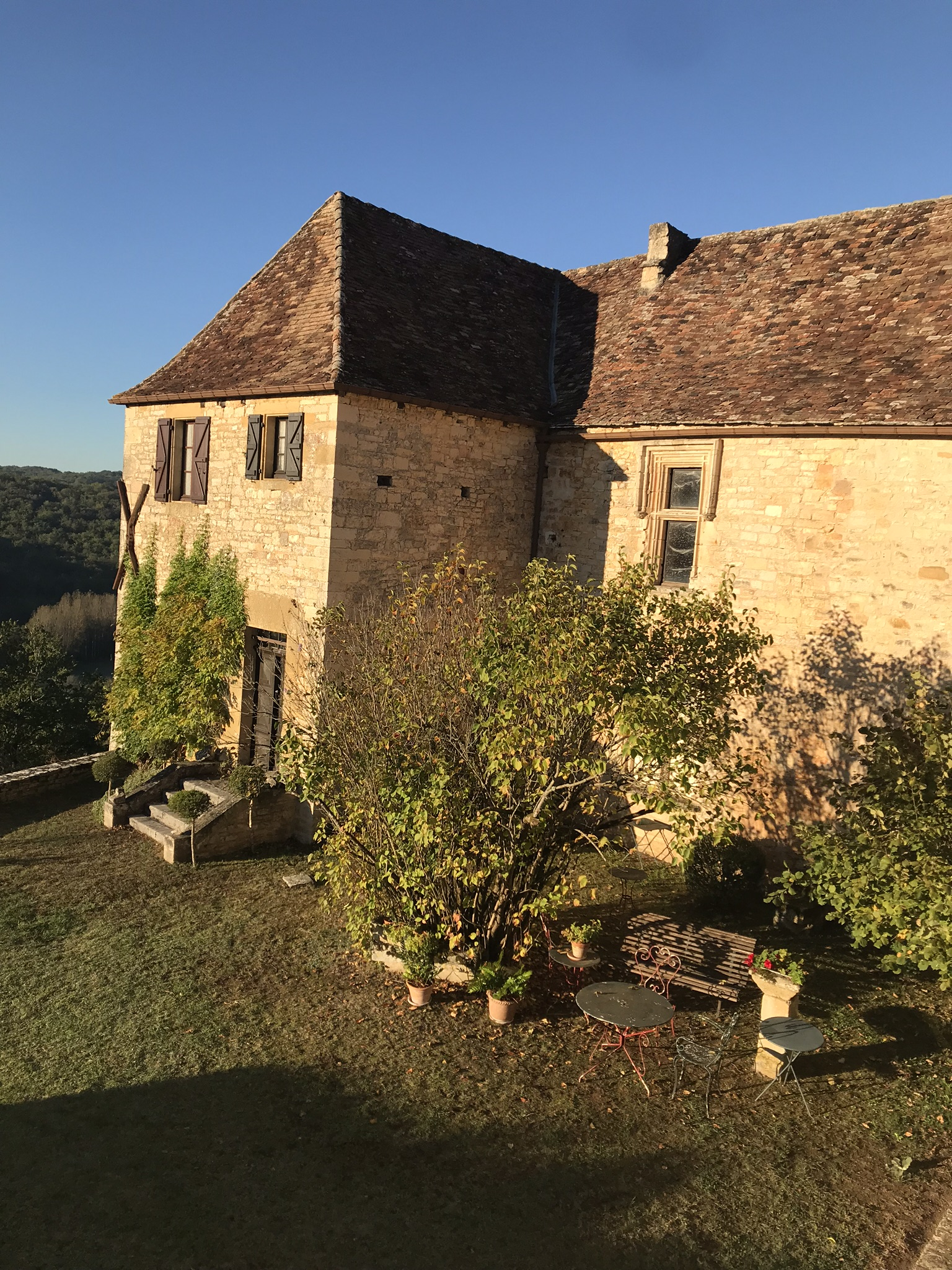 Chateau